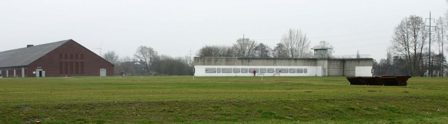 Neugestaltetes Freigelände des ehemaligen KZ Neuengamme